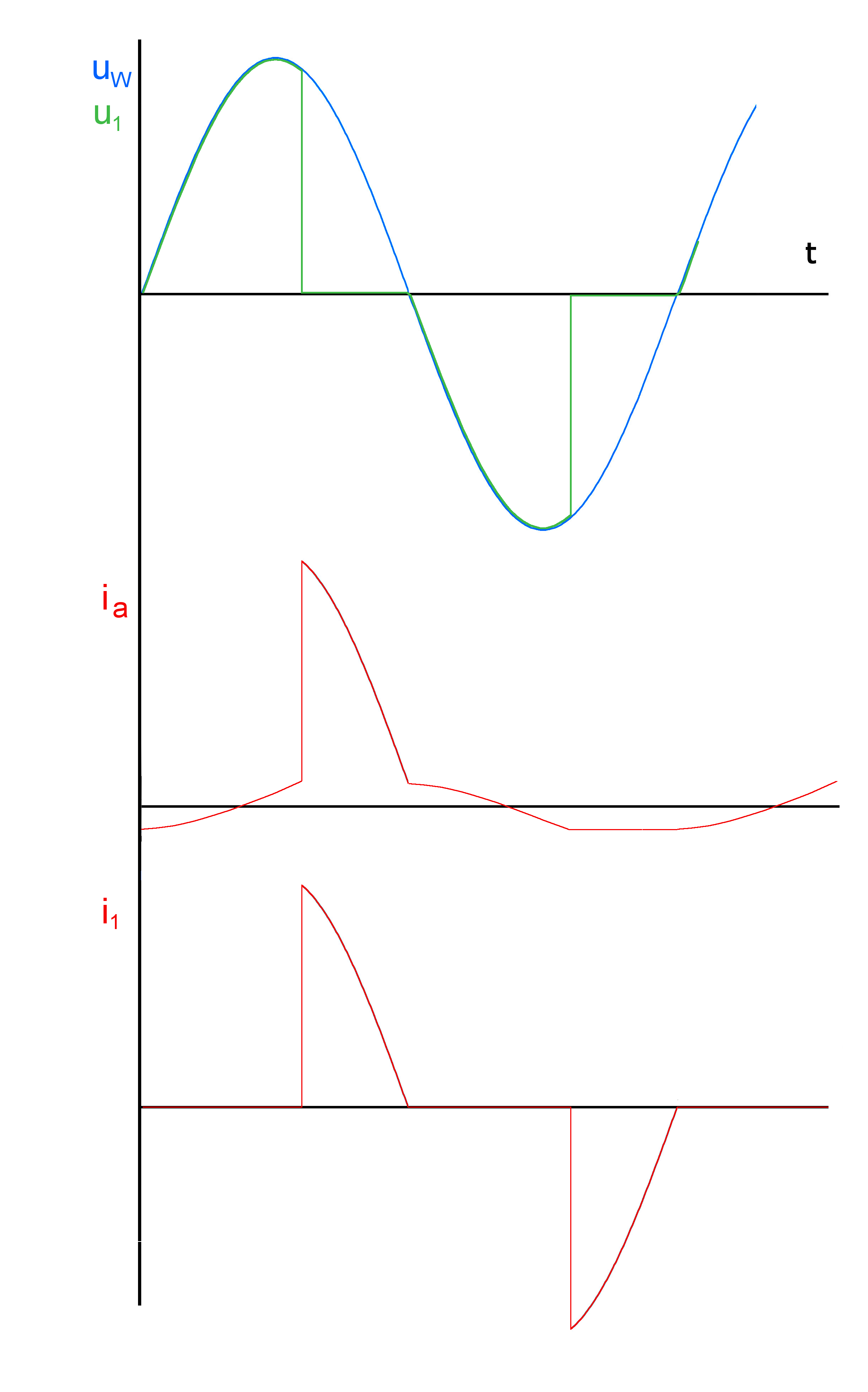 zeitliche Verläufe für einen Transduktor in Gegentaktschaltung